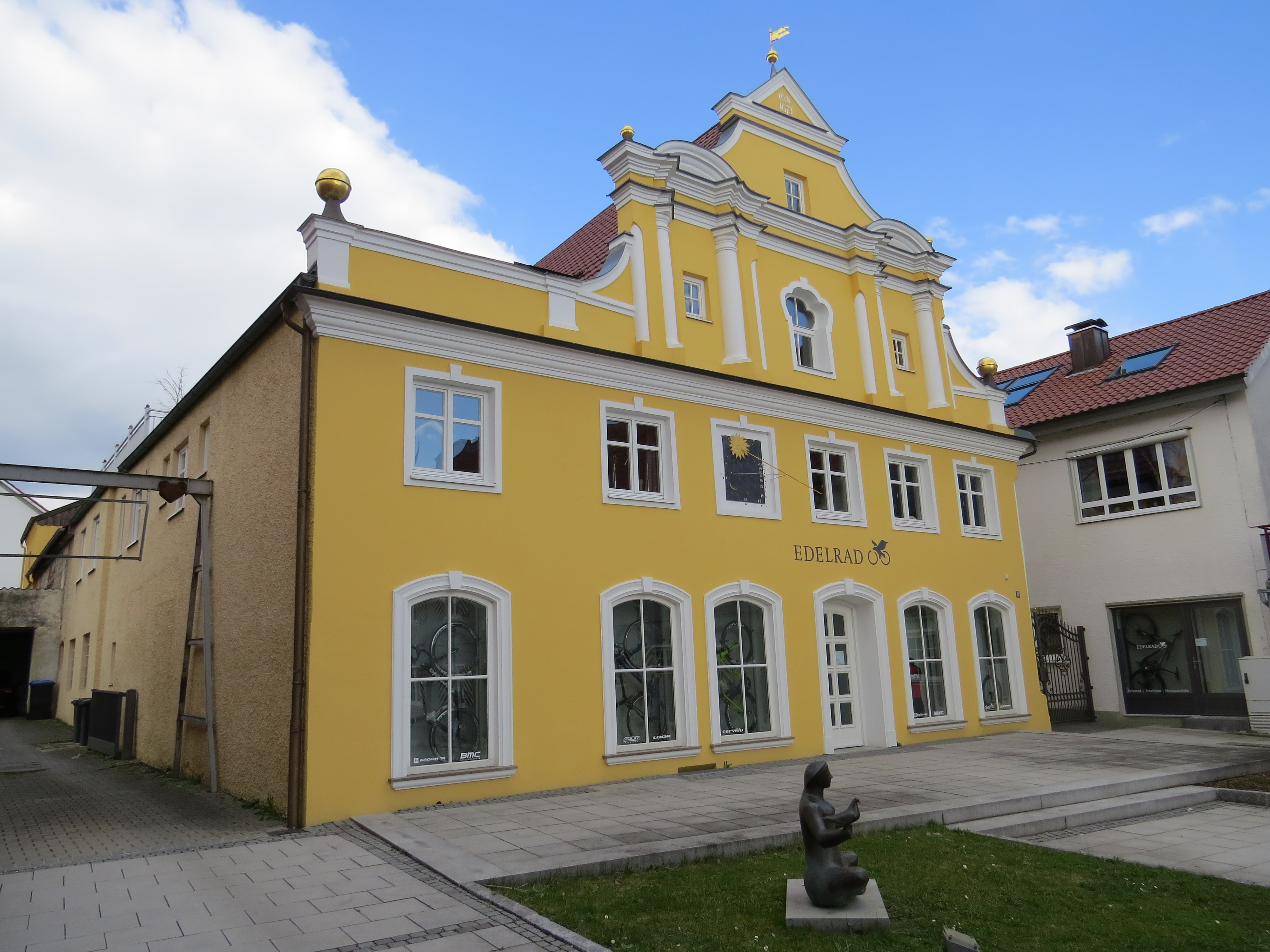 Ehem. Gerichtshaus in Thannhausen